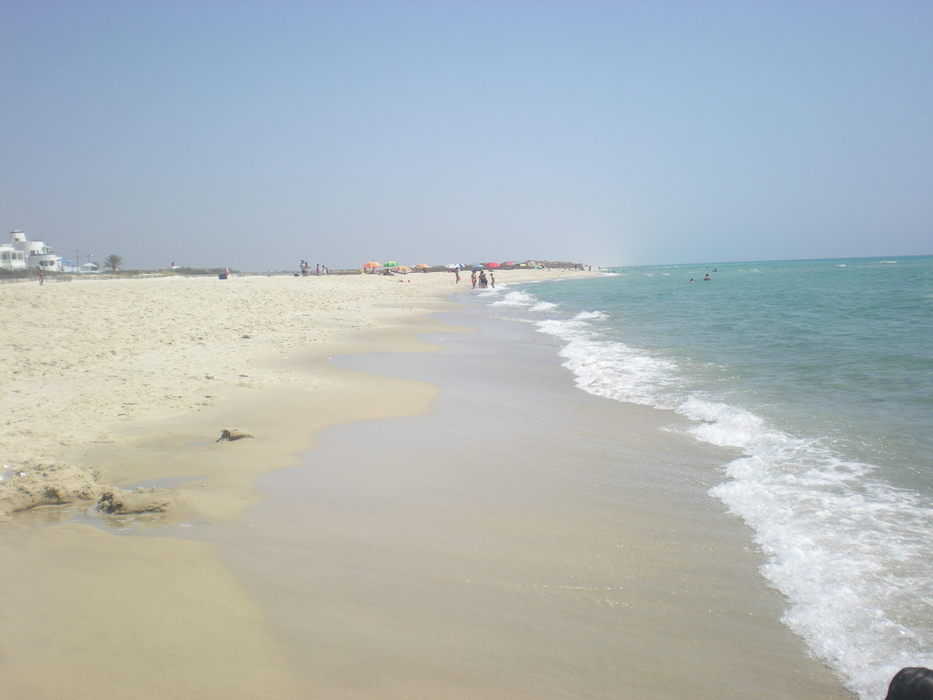 Longue plage de Korba, sur la façade orientale du cap Bon.